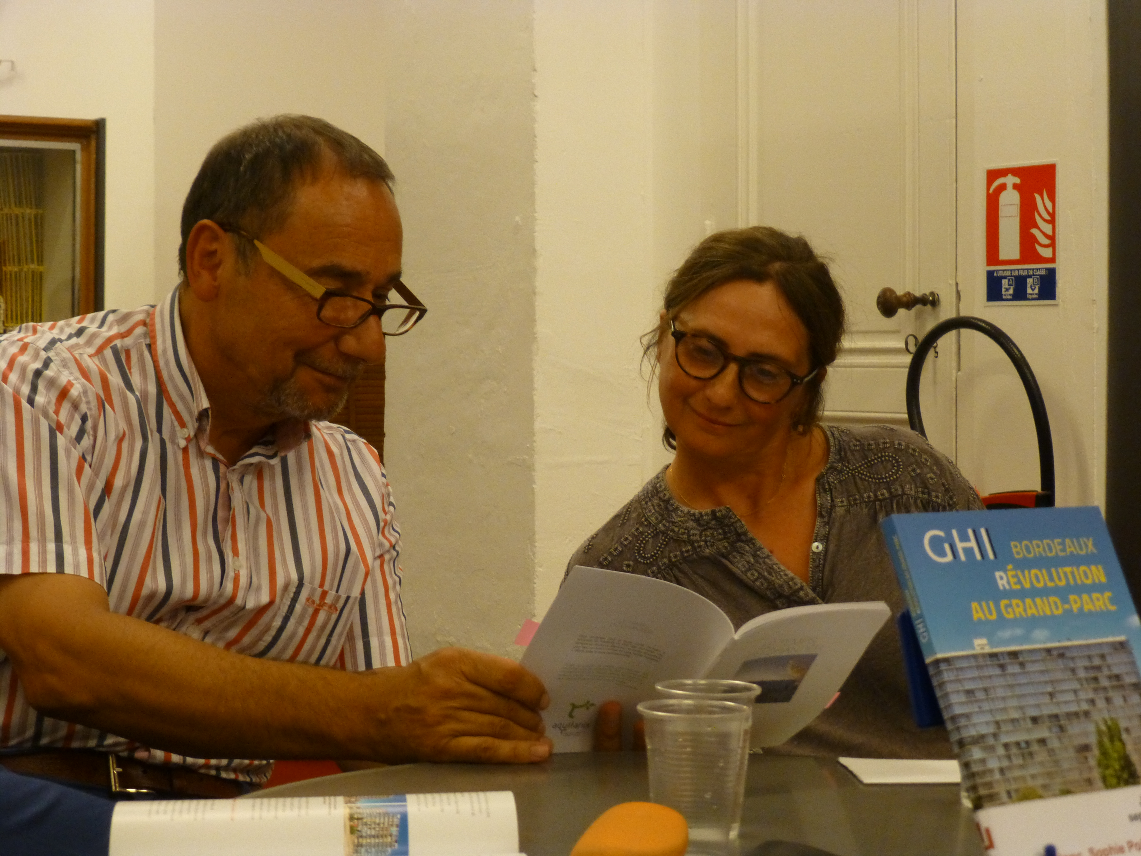 Présentation de GHI-Grand Parc (Le Festin) par La Machine à Lire le 1er septembre 2016 ː le directeur d'Aquitanis et Sophie Poirier.